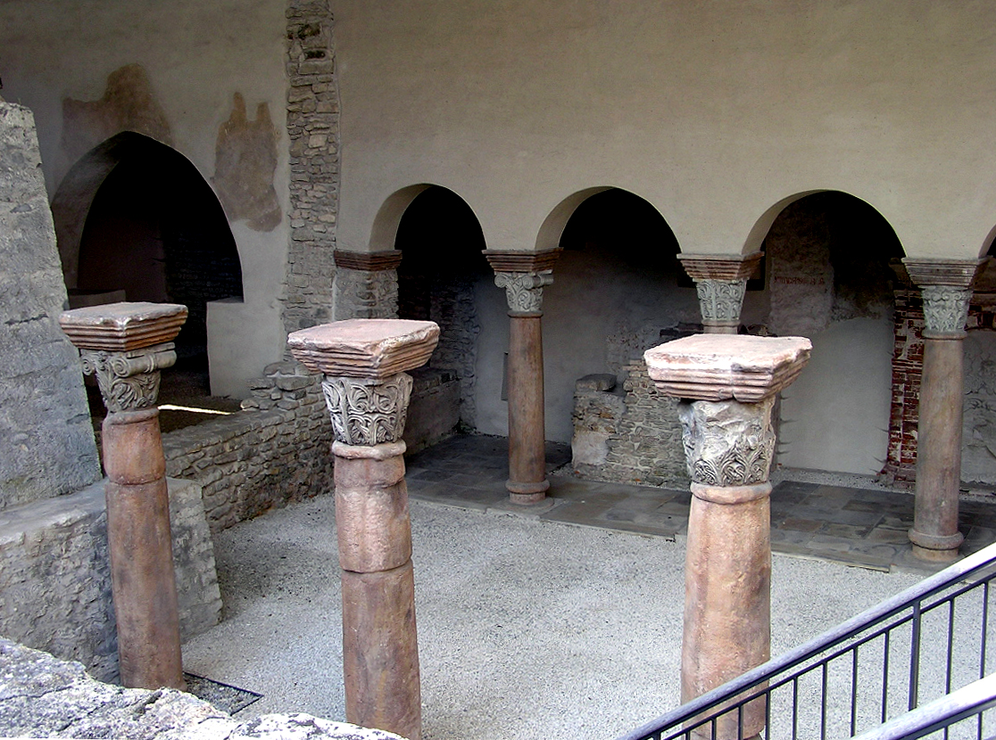 Sola-Basilika Solnhofen Quelle: Fotografiert am 03.09.04 Fotograf: Richard Schubert Lizenzstatus: GNU FDL